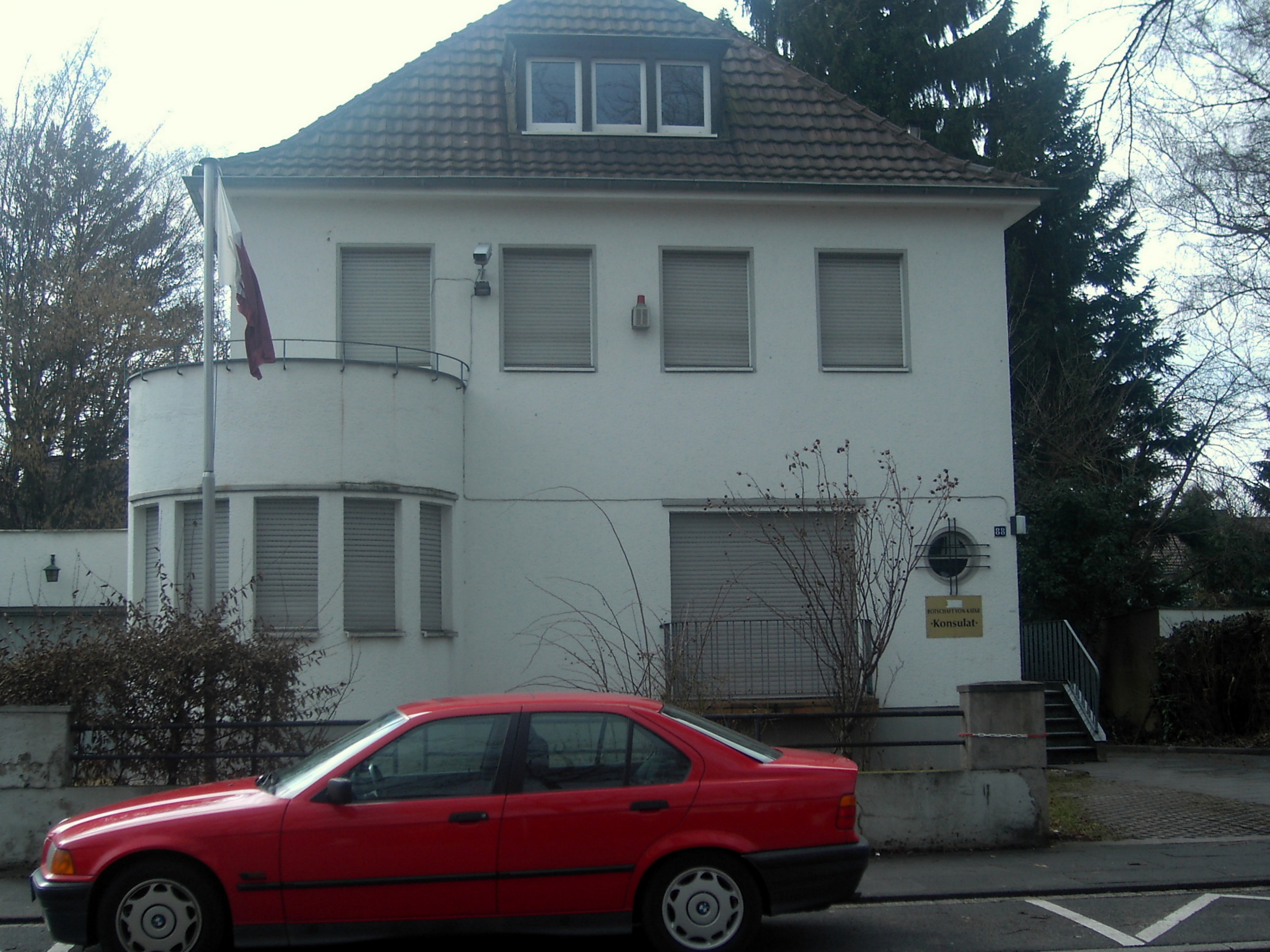 Konsulat der Botschaft Katars (bis 2009) in der Ubierstraße 88 in Bad Godesberg, Ortsteil Godesberg-Vilenviertel